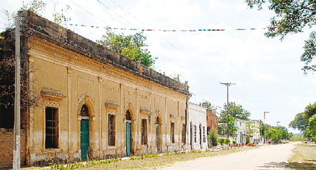 casa colonial en la ciudad de humaitá